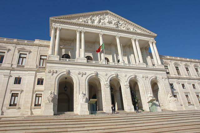 Photographer: Osvaldo Gago